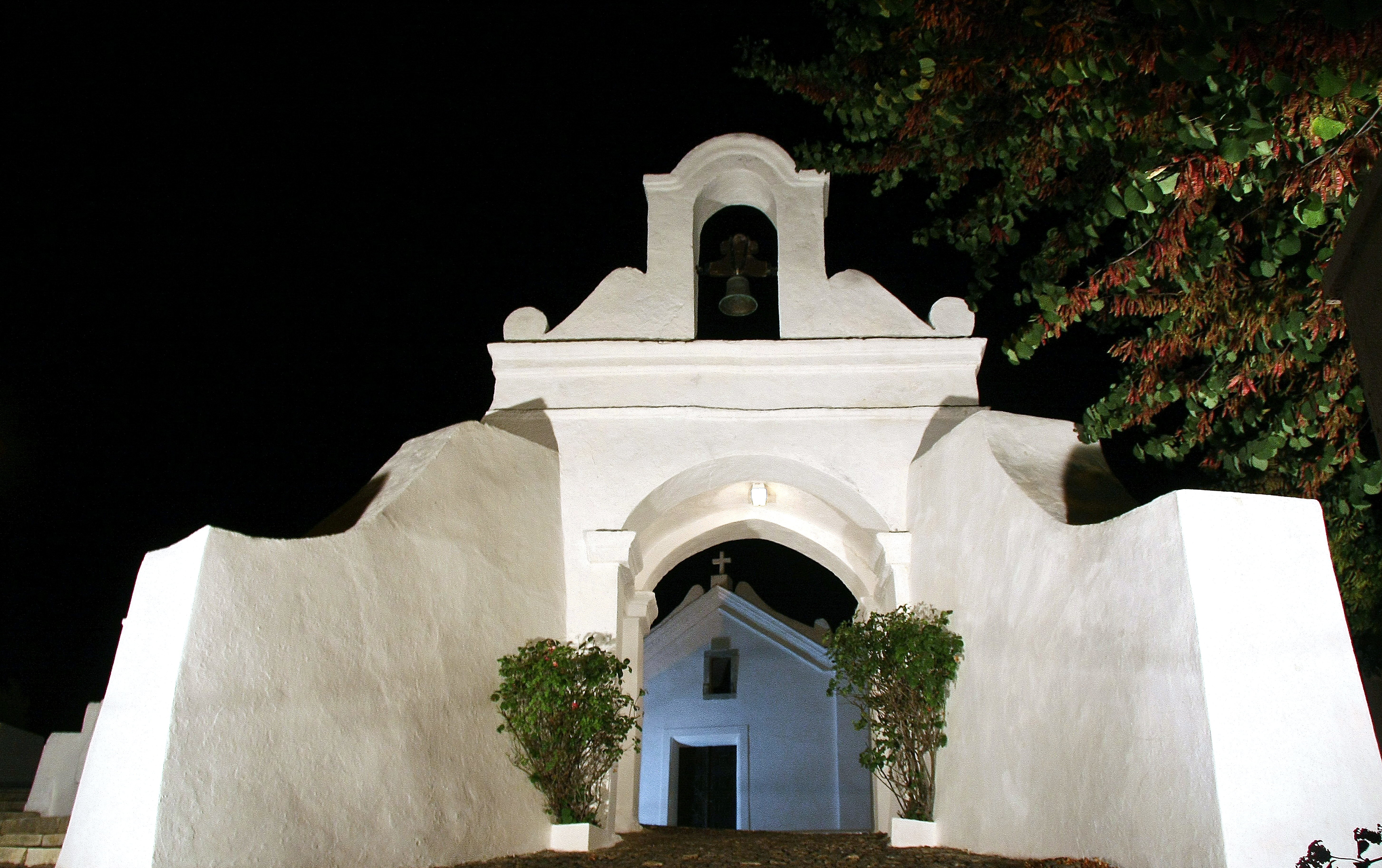 Ermida de peregrinação, situada no concelho de Aljustrel, antecedida por um escadório monumental, uma arcada e um terreiro. Ao seu lado jazem as ruínas do castelo de Aljustrel que foi construído por habitantes árabes entre os séculos VIII e XII, possivelmente no local de antigo castro romanizado.Foi edificada provavelmente no século XVI/XVII. Passado um século, foi aumentado o espaço da nave pela inclusão da antiga galilé e foram construídos o arco e o escadório de acesso. A igreja possui planta composta pelos retângulos justapostos da nave e da capela-mor, sendo esta menor, com anexos também retangulares, correspondentes à sacristia e primitiva casa dos romeiros, hoje habitação particular. Foi decretada Imóvel de Interesse Público. See where this picture was taken. [?]